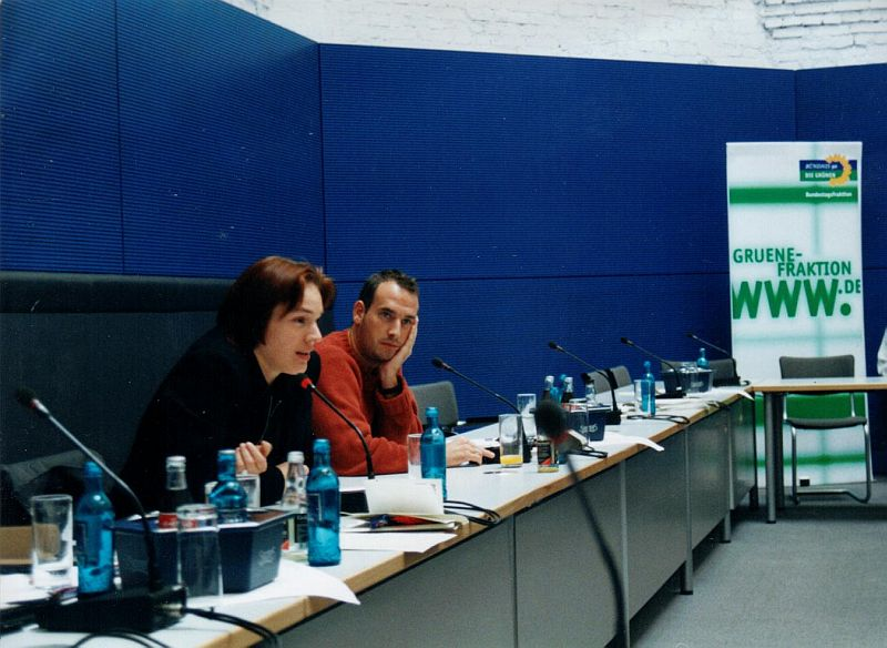 La bildo estas kopiita de de.wikipedia. La originala priskribo estas: Sitzungssaal der Fraktion von Bündnis 90/Die Grünen im Reichstagsgebäude des Bundestages, 3. Stock. Zu sehen sind die Bundestagsabgeordneten Christian Simmert und Grietje Bettin. Aufnahme von 2001. Fotograf: Eilmeldung, die konkludente Zustimmung von Christian Simmert und Grietje Bettin liegt vor.